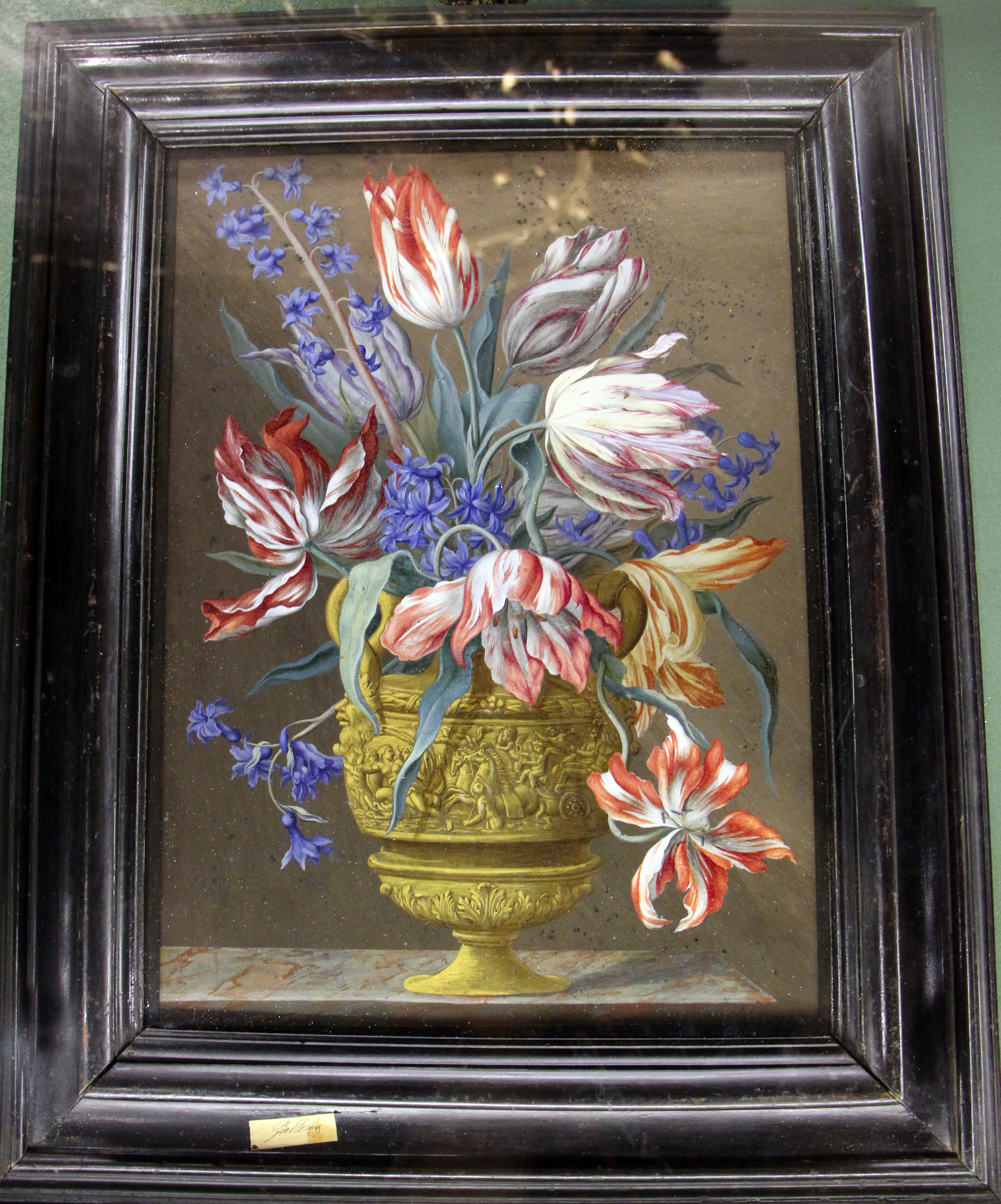 Villa medicea di Poggio a Caiano - MIBAC The making of this document was supported by Wikimedia CH. (Submit your project!) For all the files concerned, please see the category Supported by Wikimedia CH. This is a photo of a monument which is part of cultural heritage of Italy.